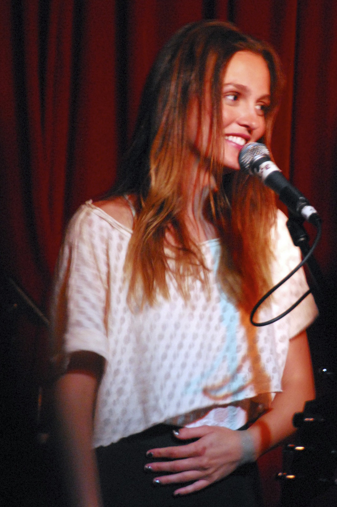 Leighton Meester in 2011.